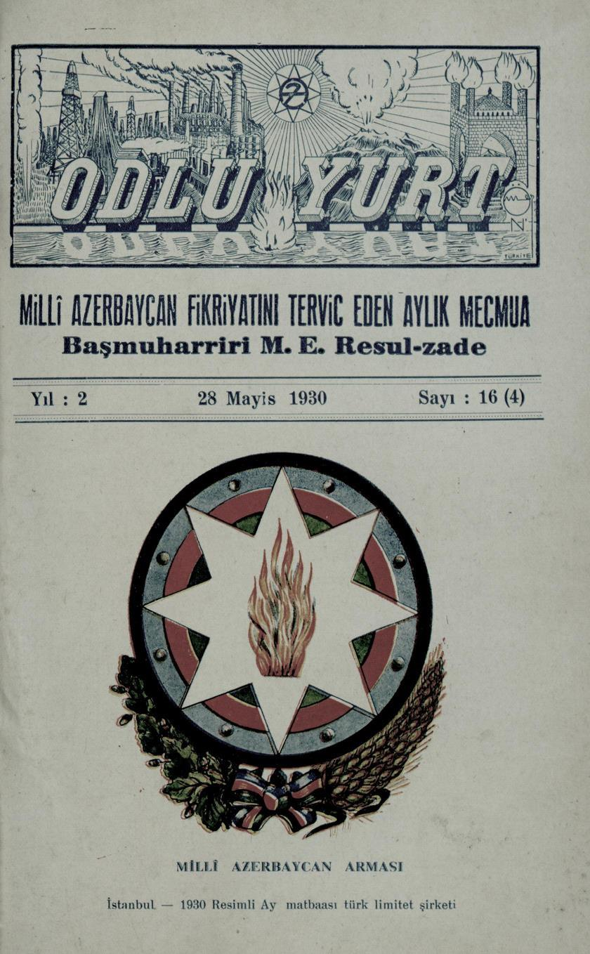 "Odlu Yurt" jurnalının 16 (4) -cı sayı